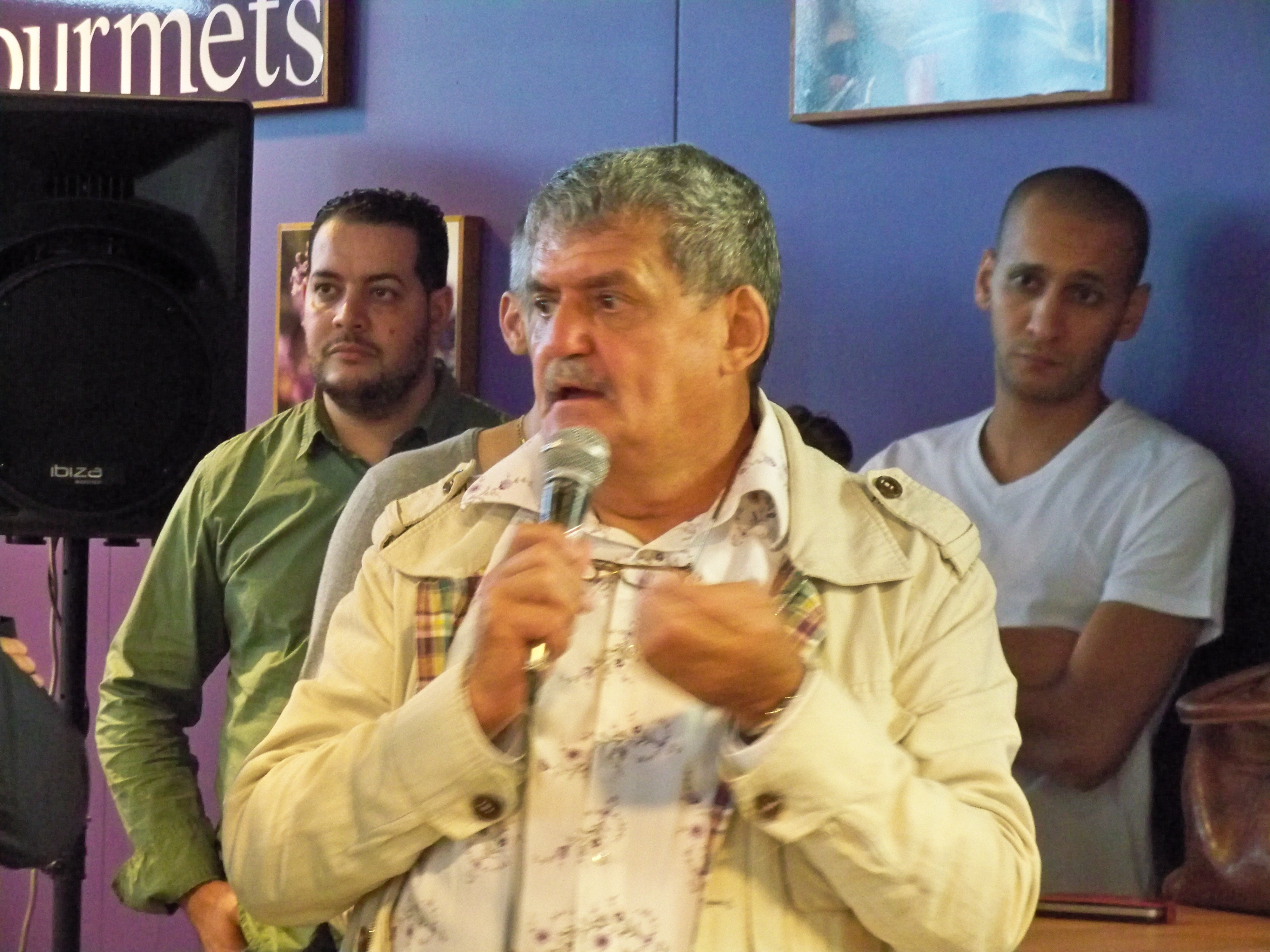 Christian Etienne, lors de la fête de la Gastronomie aux Carré des Gourmets de Vedène (84)